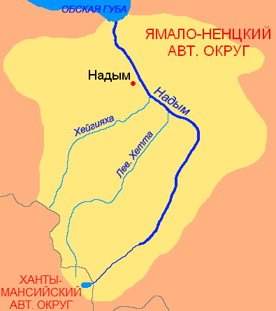 Схема бассейна реки Надым